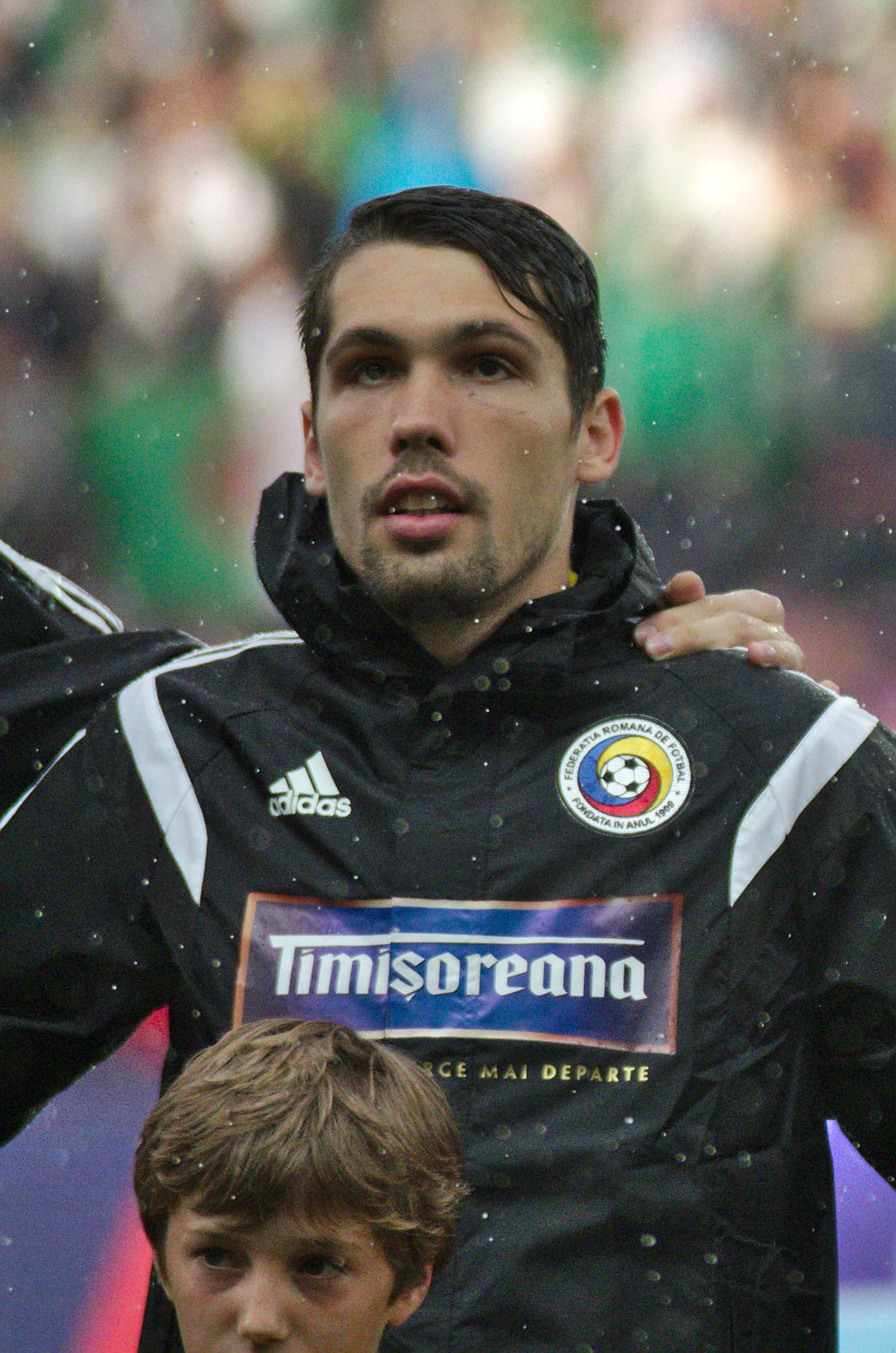 Algérie-Roumanie - 20140604 - Valerică Găman